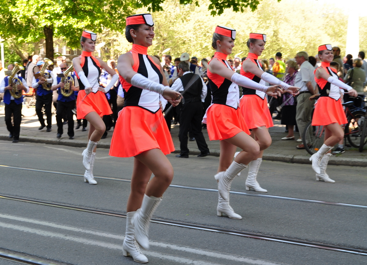 Mażoretki